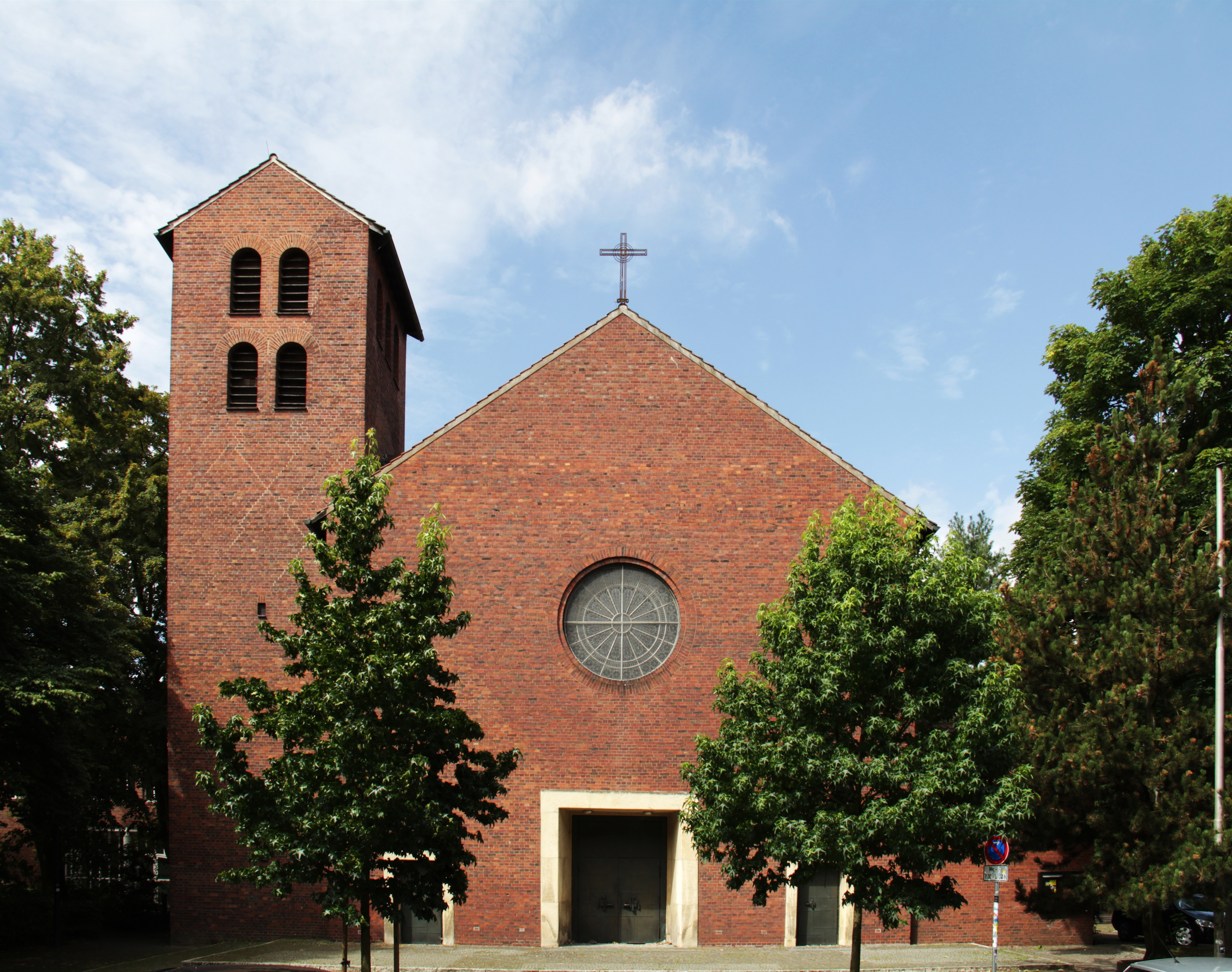 Elisabethkirche in Münster, Hansaviertel